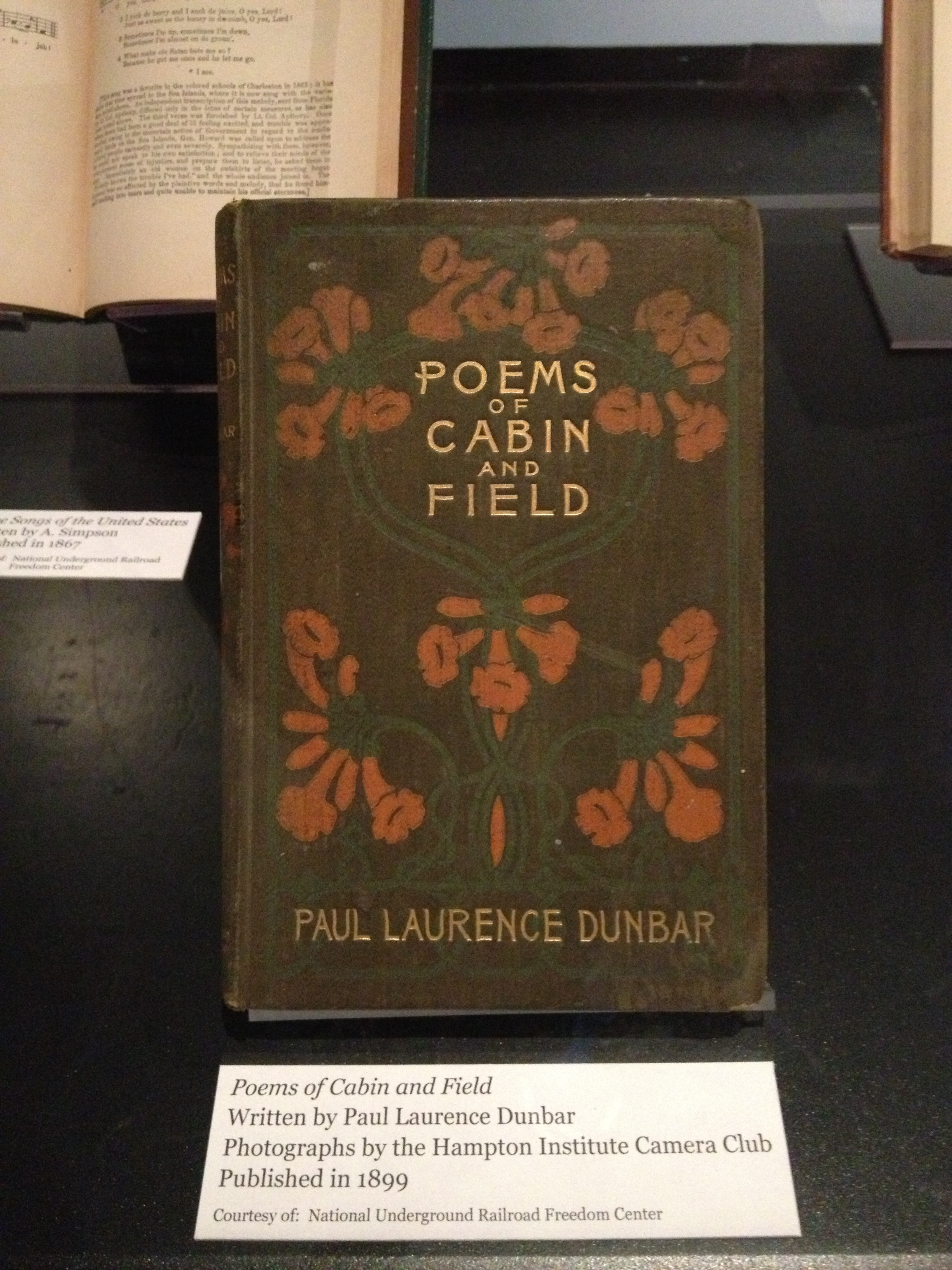 Book